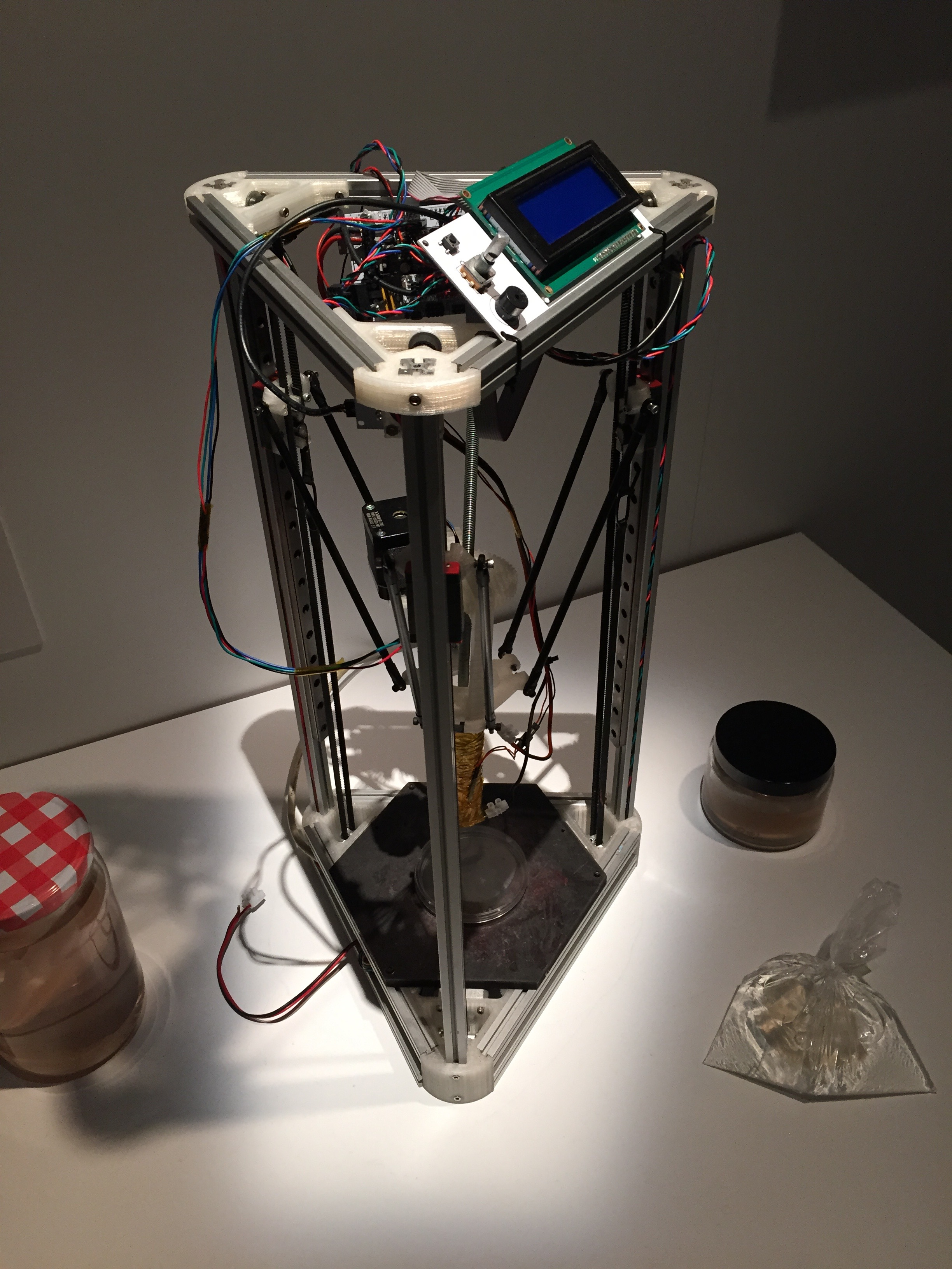 +Humans, exposició que va tenir lloc la tardor de 2015 al Centre de Cultura Contemporània de Barcelona